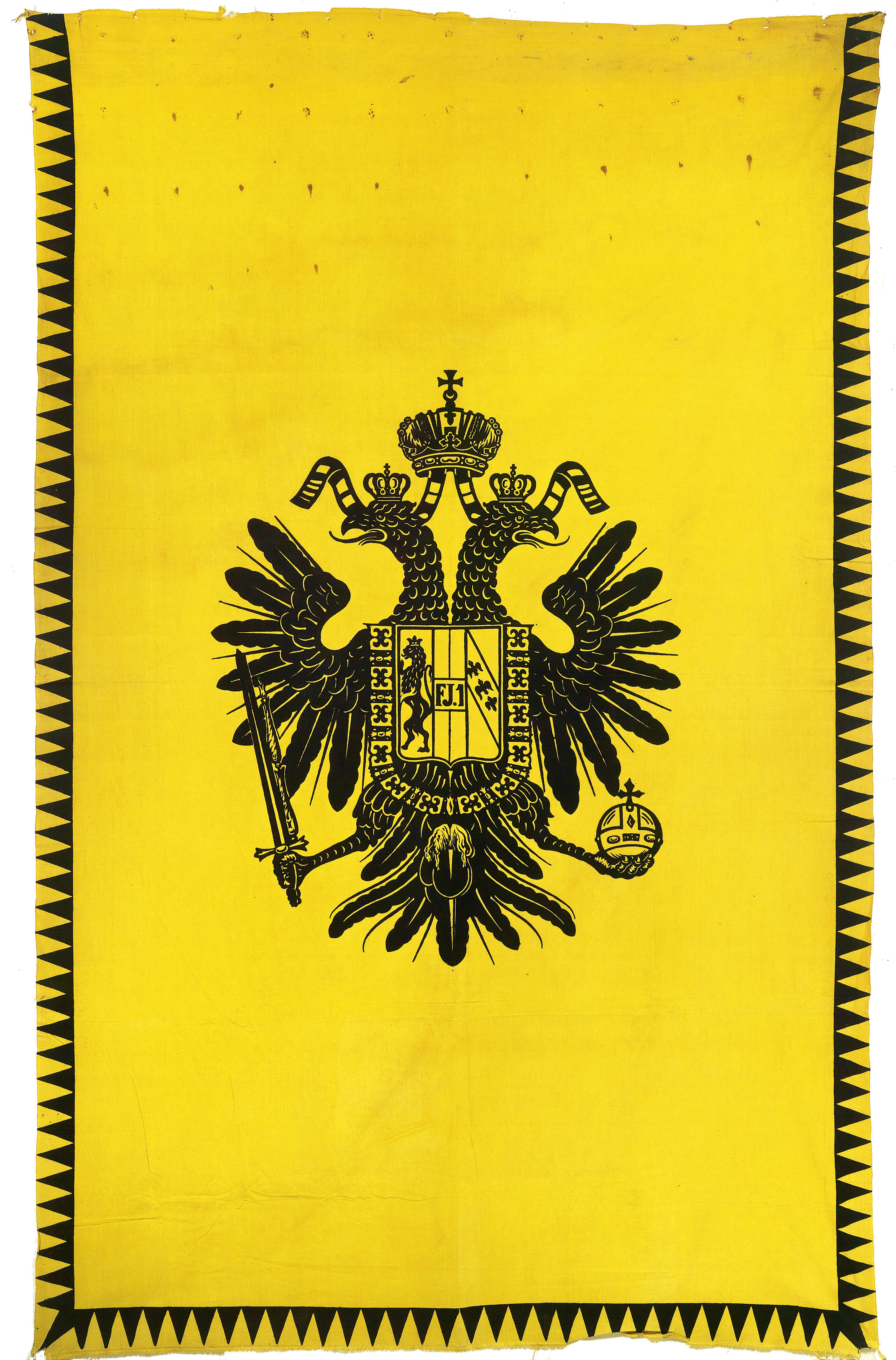 Fahne Kaisertum Österreich; Leinen, beidseitig schwarz gedruckter kaiserlicher Doppeladler, 236 x 150 cm